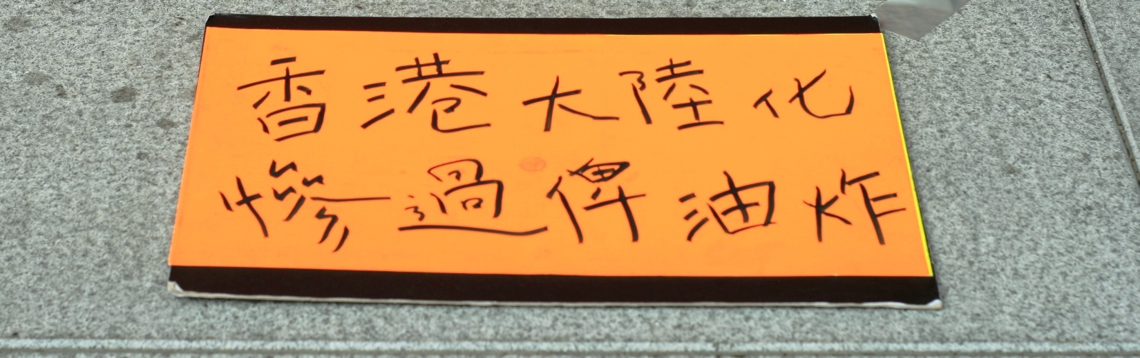 港中矛盾.